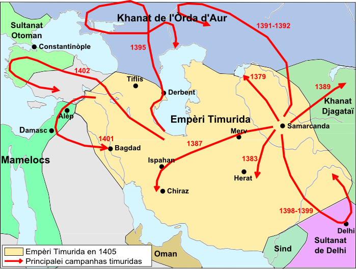 Formacion de l'Empèri Timurida e extension en 1405.